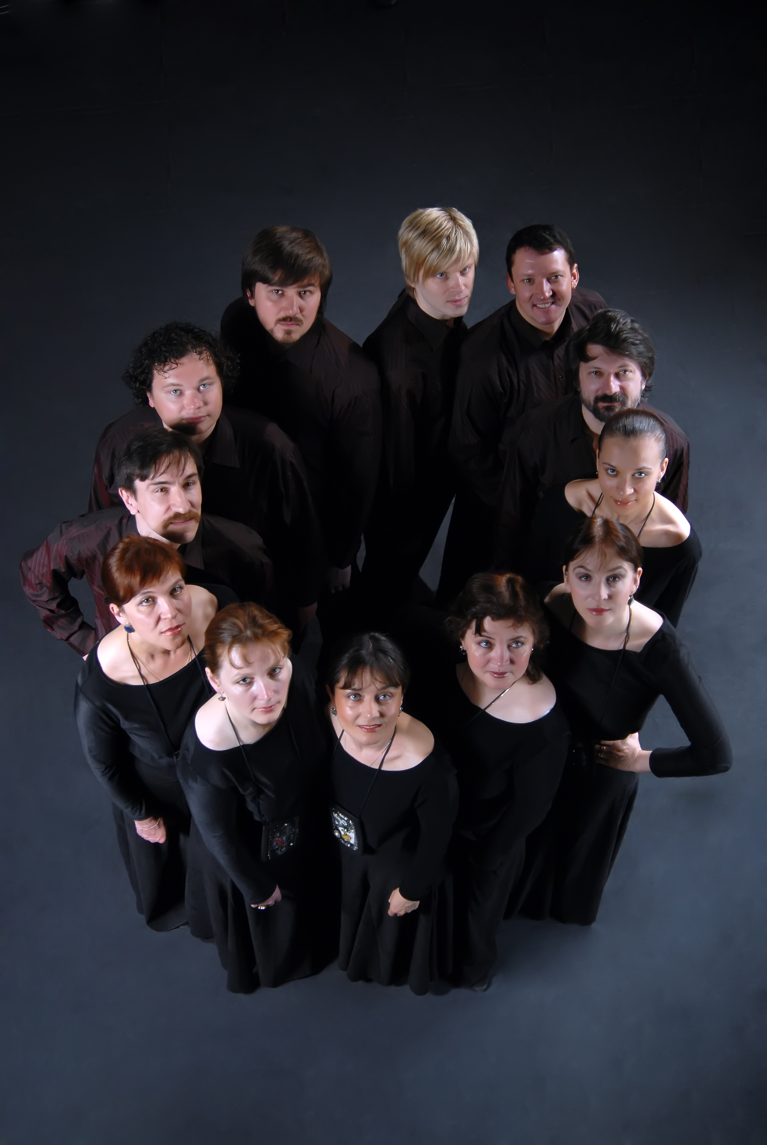 Фотография с репетиции Ансамбля Дмитрия Покровского, программа духовой музыки. 2009 год.